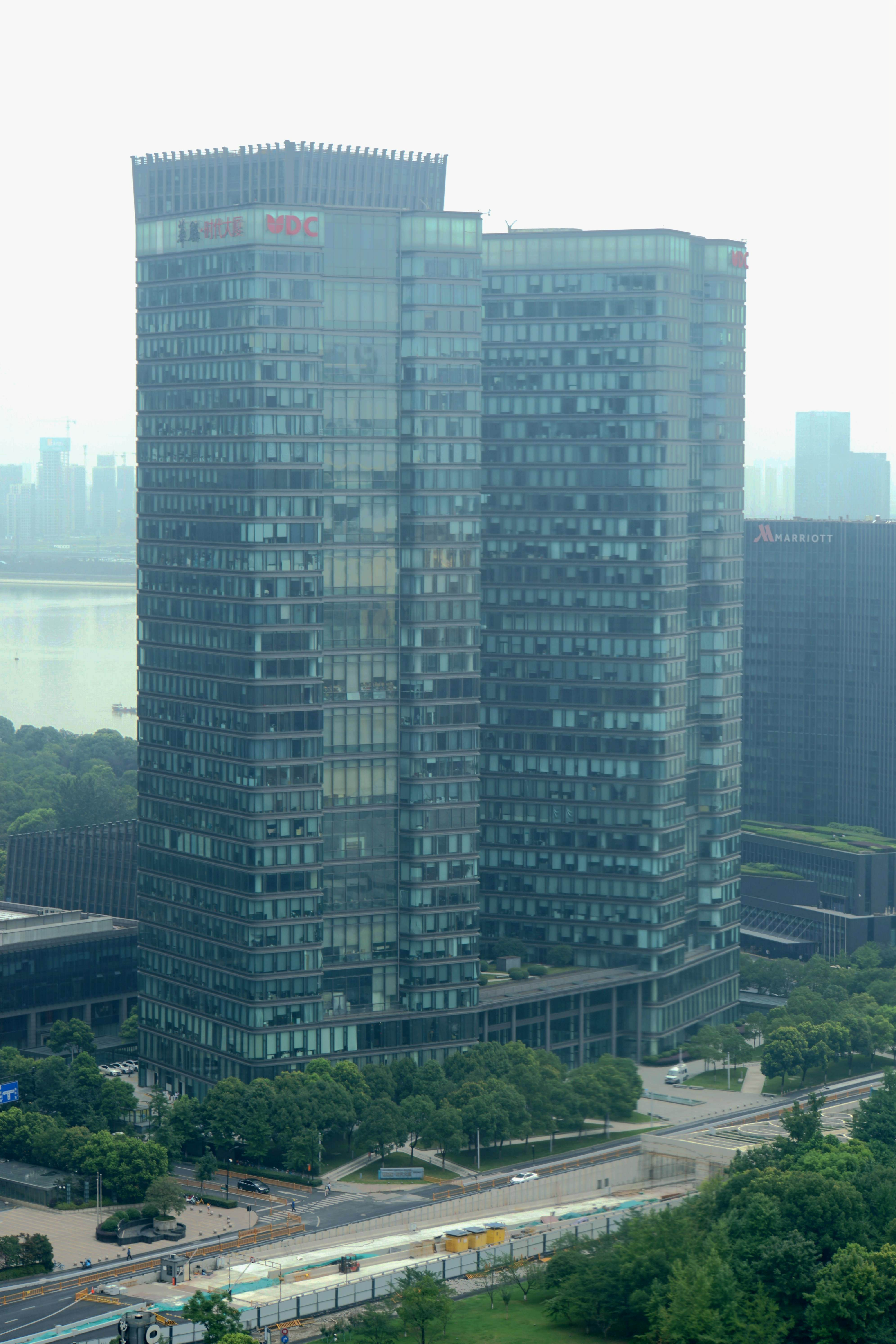 20200714UDC大楼